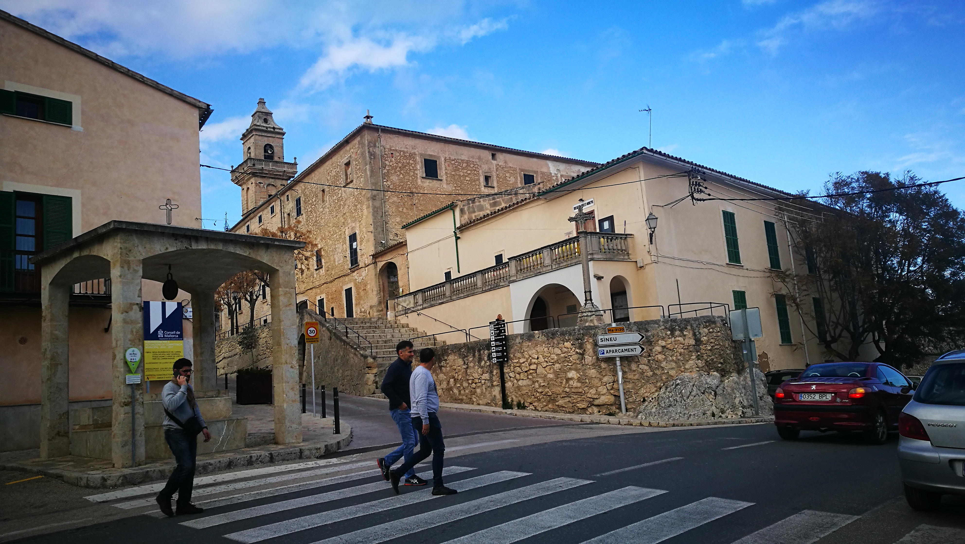 carretera de la Ciutat amb pou i biblioteca a Lloret de Vistalegre amb campanar al fons